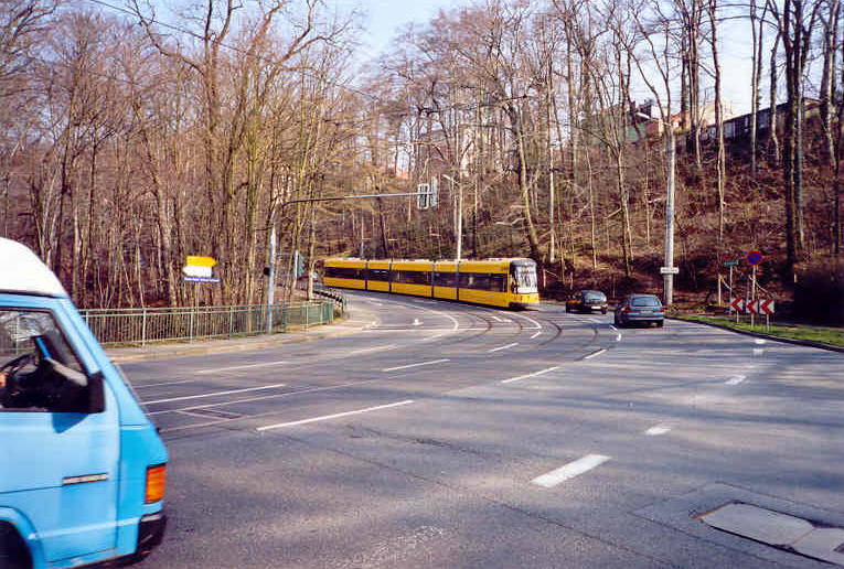 Bundesstraße 6 in Dresden an der Mordgrundbrücke (Kreuzung Bautzner Straße/Bautzner Landstraße/Schillerstraße)